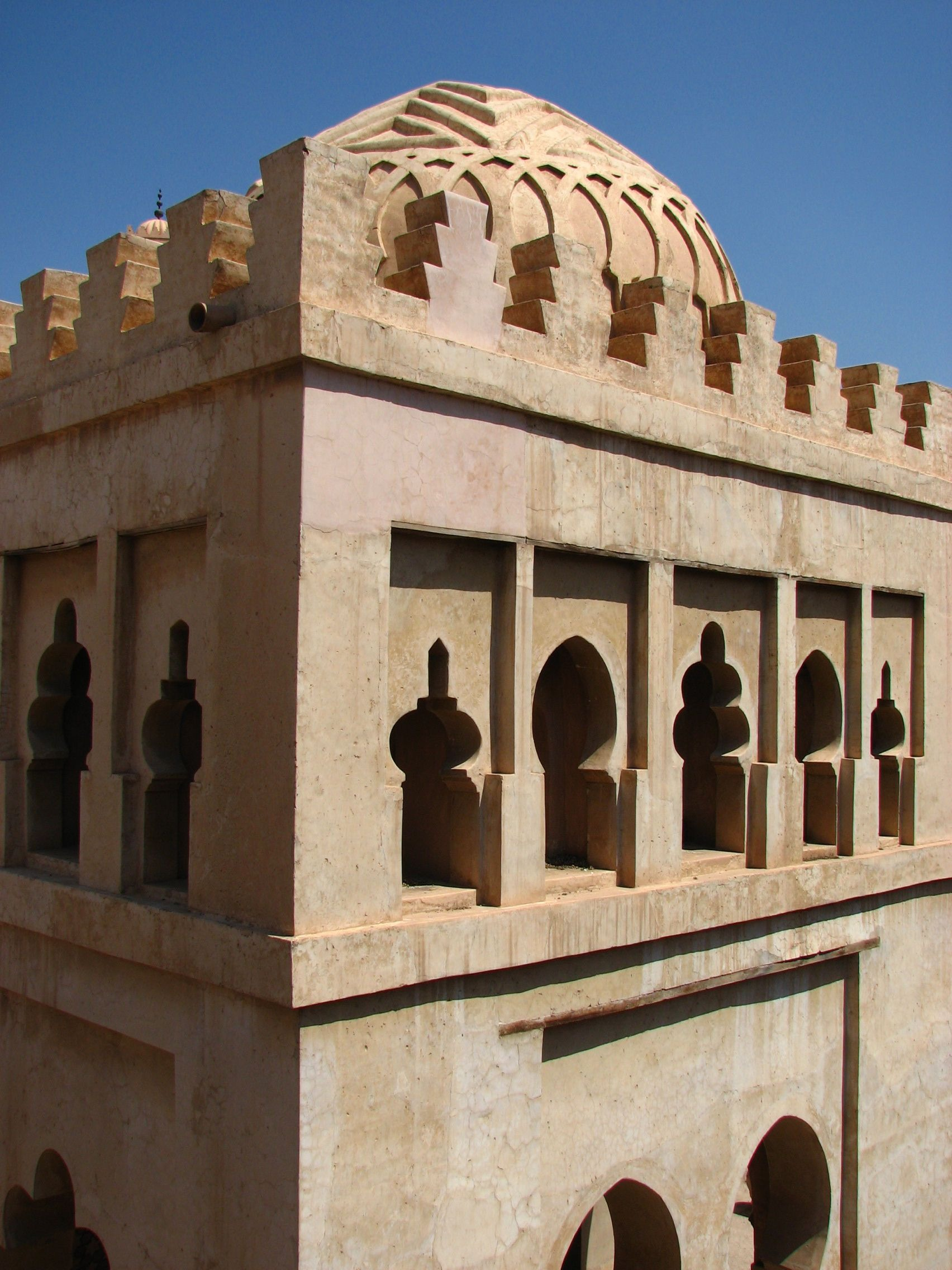 Cúpula almorávide de Marrakech, vista exterior (c. 1120)